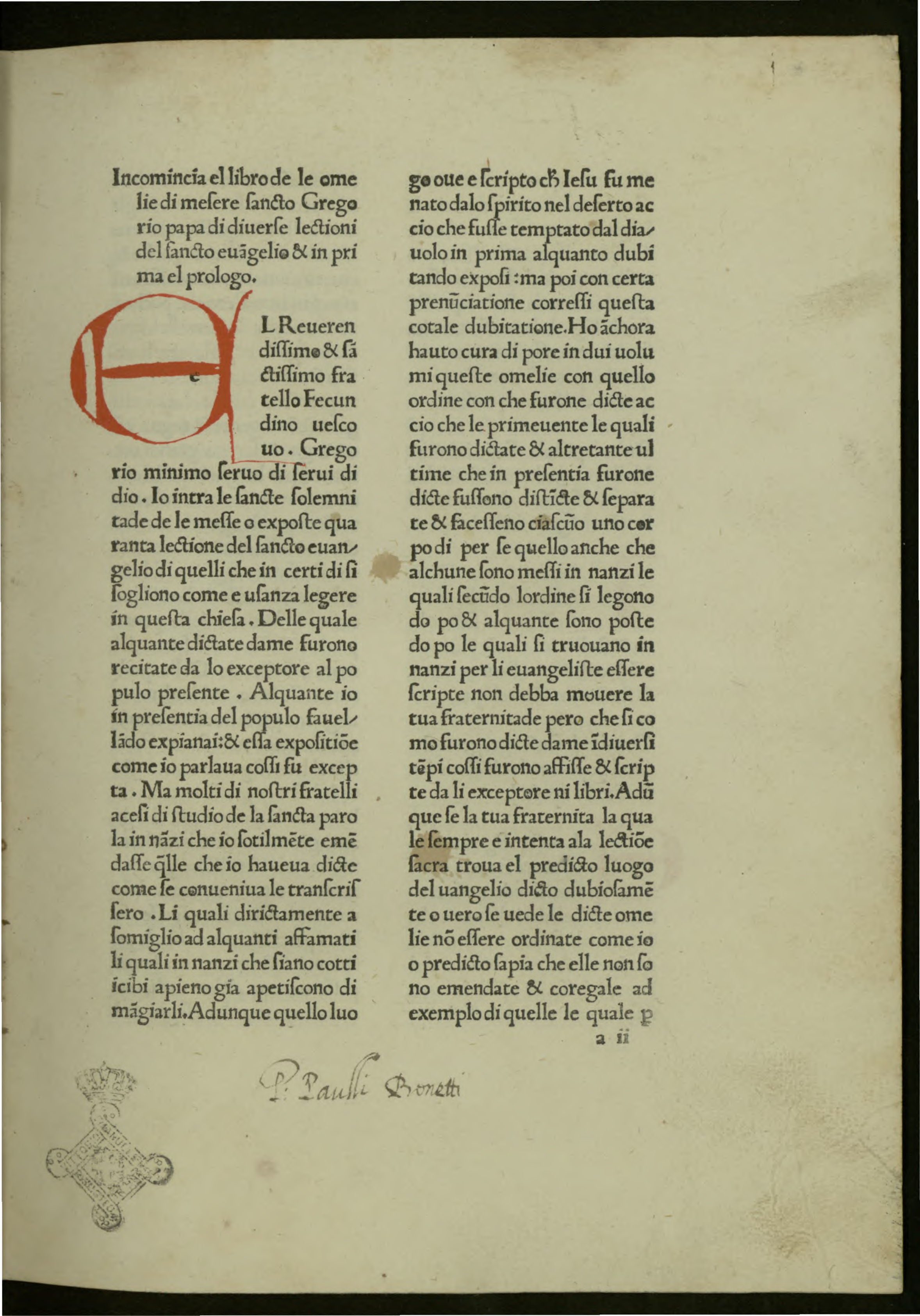 Homiliae in Evangelia (italiano). - Impresso a Mediolano : mediante la gratia di Dio de li prudenti homini Leonardo Pachel e Uldericho scinzcenceller de allamagna per loro industria, MCCCCLXXVIIII adi XX del mese de augusto. - 158 c. ; a-s⁸, t⁶, v⁸ ; 4°. - Manca la c. a1 .